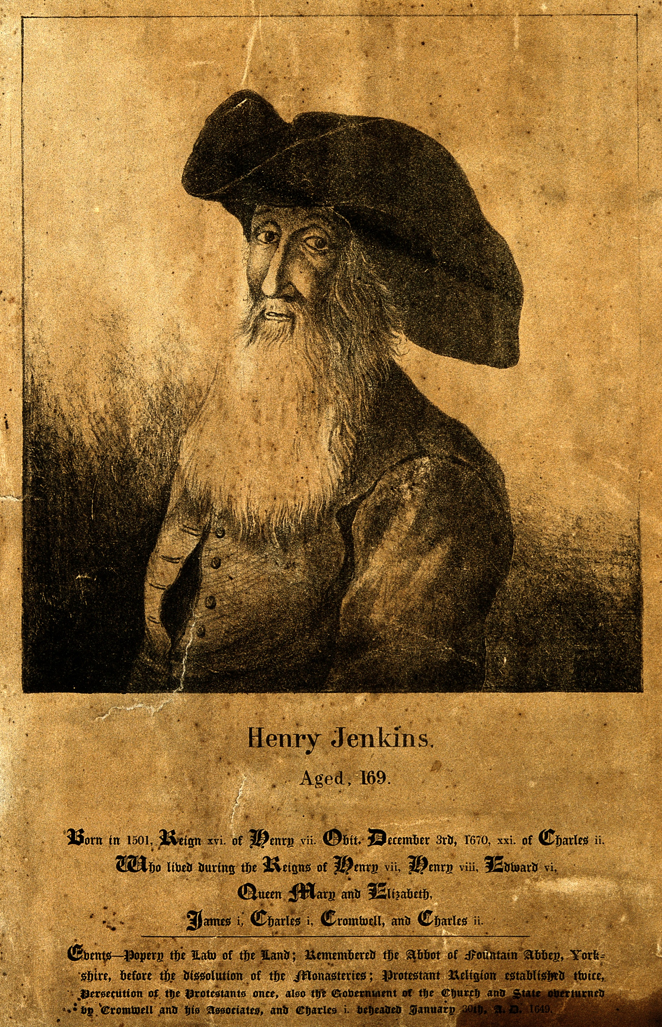 Genre/Technique: Portrait prints. Lithographs. Subject name: Jenkins, Henry, ca. 1501-1670.